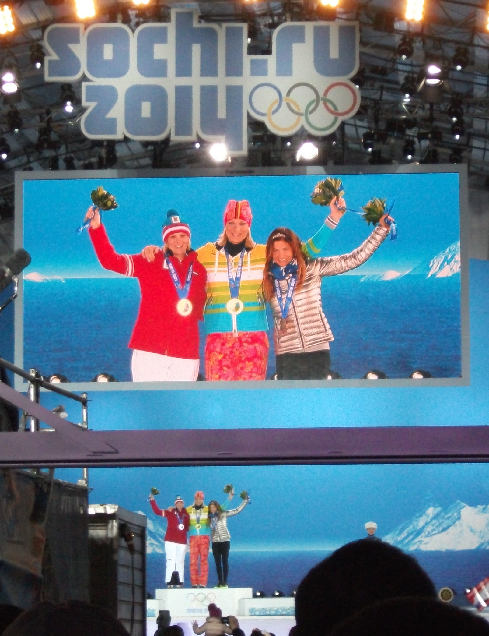 Церемония награждения победителей в соревнования по горным лыжам, суперкомбинация, на Зимних олимпийских играх в Сочи. Олимпийский парк, Медал Плаза.